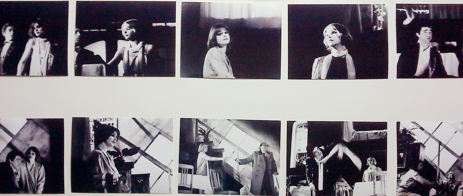 Composición de fotos de Marina Shimanskaya en la obra "Zand" en la que actuó entre 1984 y 1994 junto a Viktor Gvorditsdikiy.